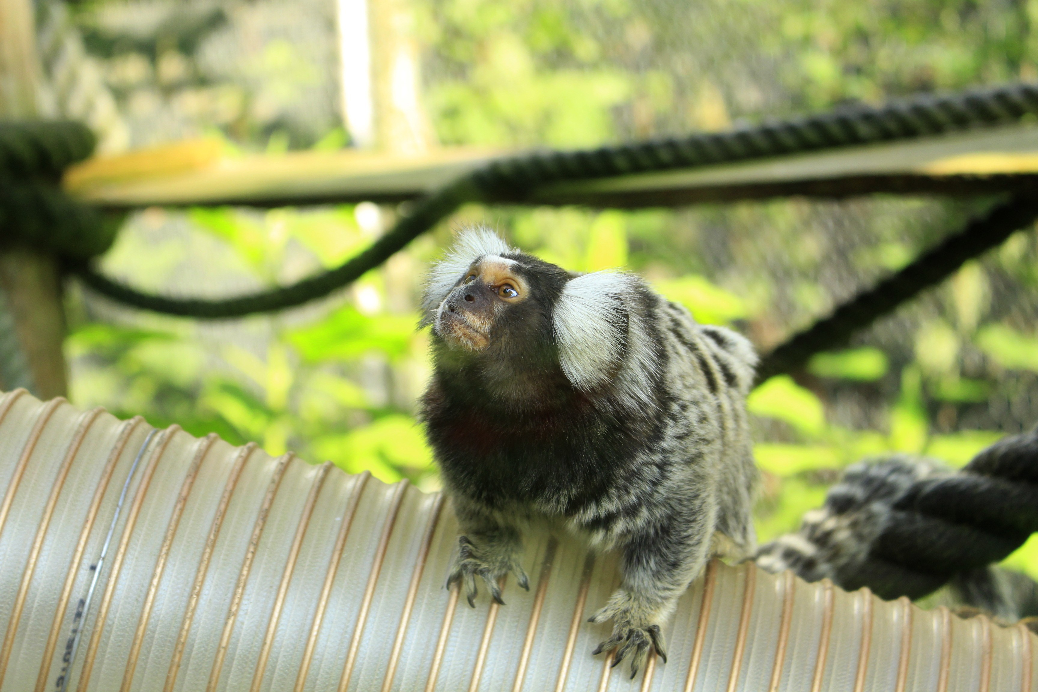 Marmozetė Lietuvos zoologijos sode